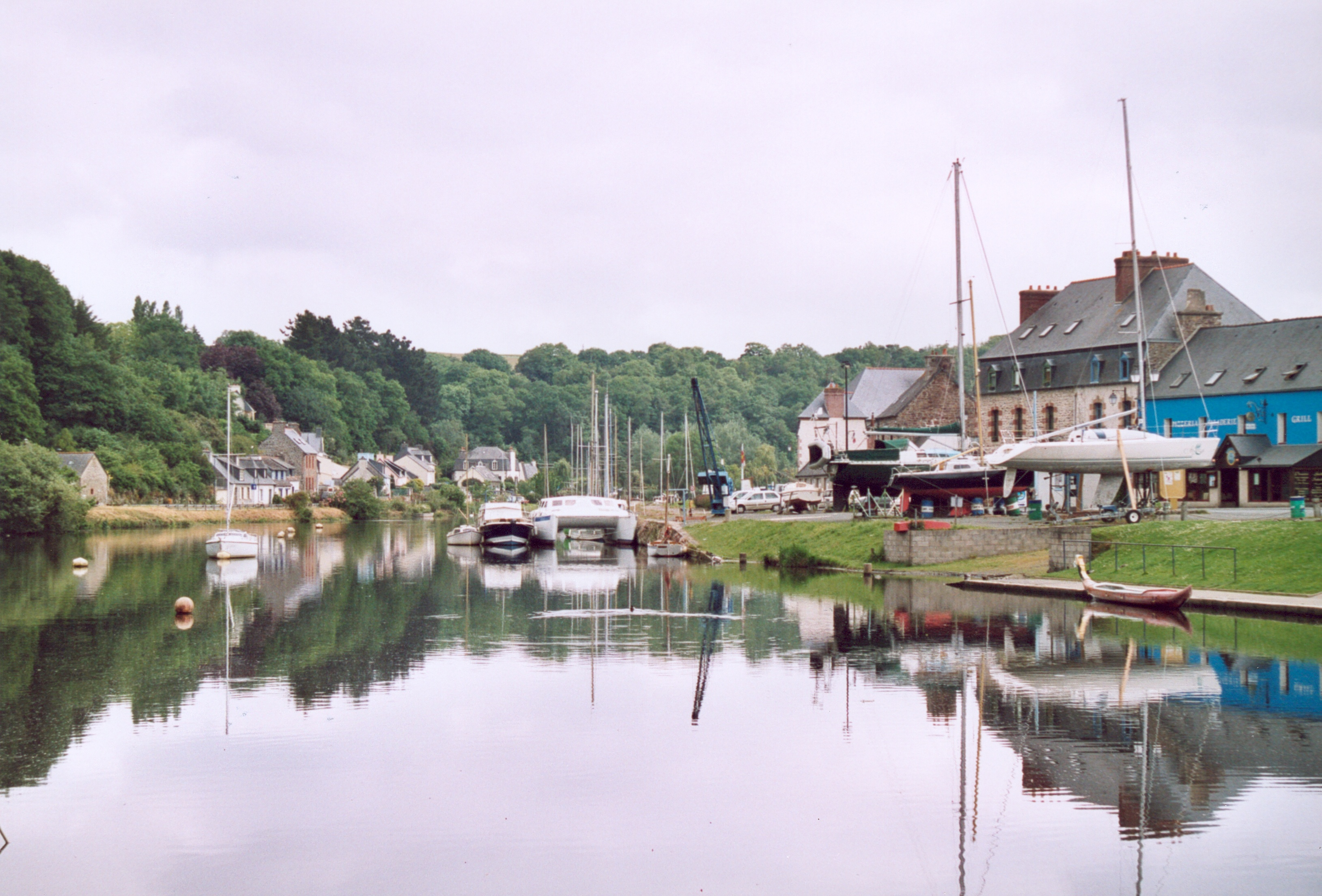 France Bretagne Côtes d'Armor Port à Pontrieux Photographie prise par GIRAUD Patrick